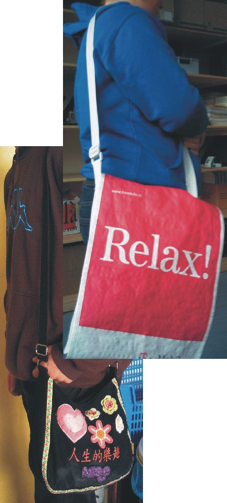 Schoudertassen